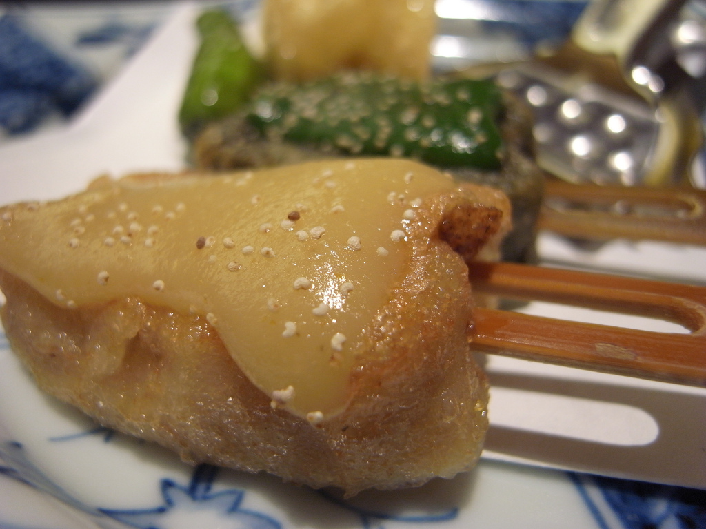 味噌田楽の写真。焼いた生麩に柚子味噌をつけています